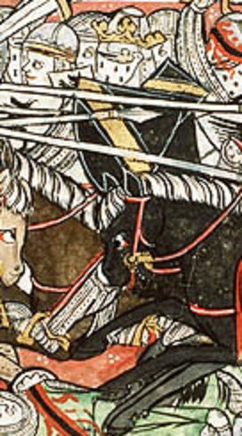 Apollinaire de Clermont ou Amalaric, deuxième chef de l'armée wisigothique. Blason d'après celui des comtes d'Auvergne, version de Châlons.